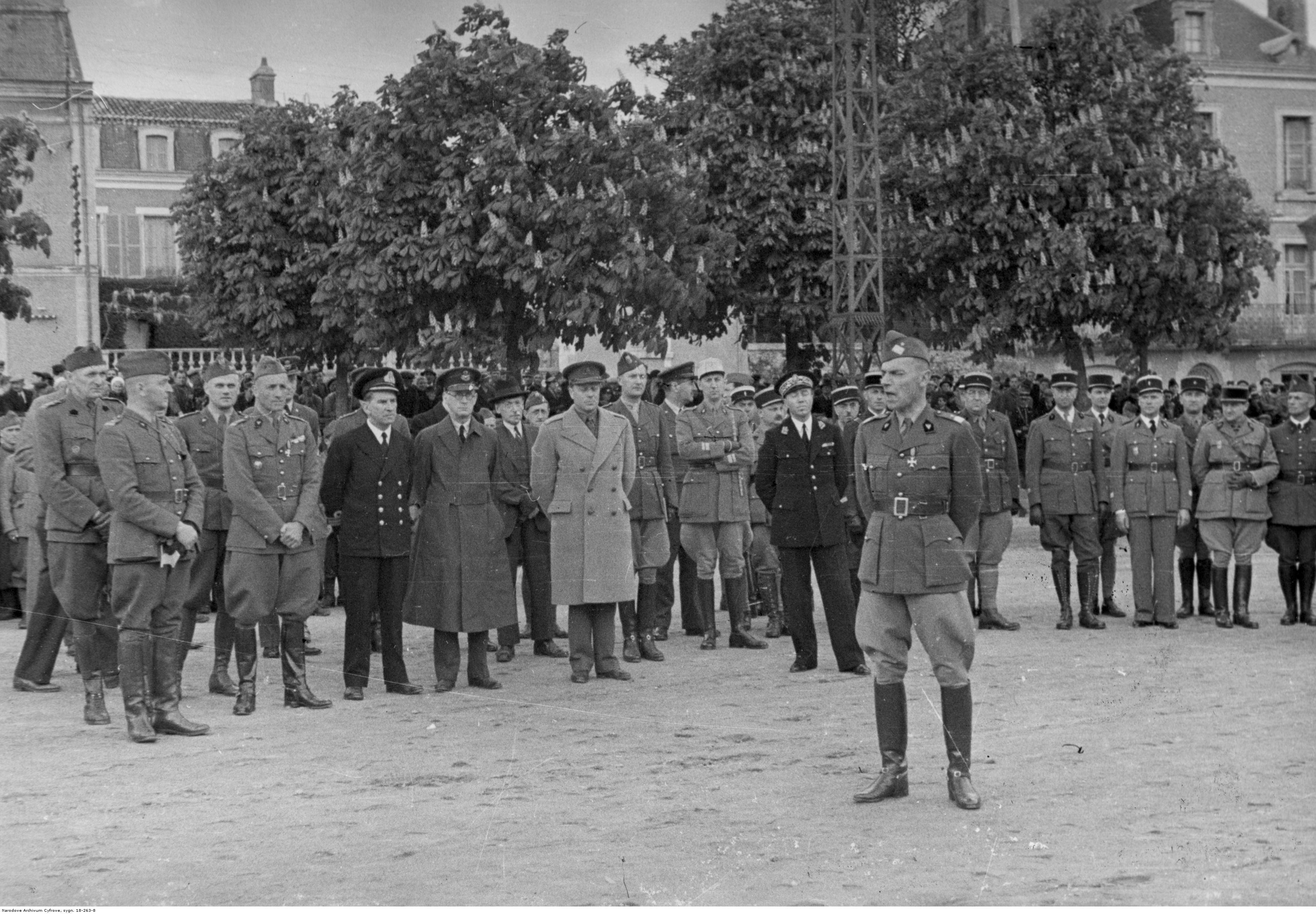 Wizyta brytyjskiej misji wojskowej w 2 Dywizji Strzelców Pieszych - powitanie misji. Na pierwszym planie przemawiający gen. Bronisław Prugar-Ketling. Widoczni także m.in.: płk. W. Dembiński, płk. S. Pelc. Archiwum Fotograficzne Czesława Datki. Sygnatura: 18-263-8